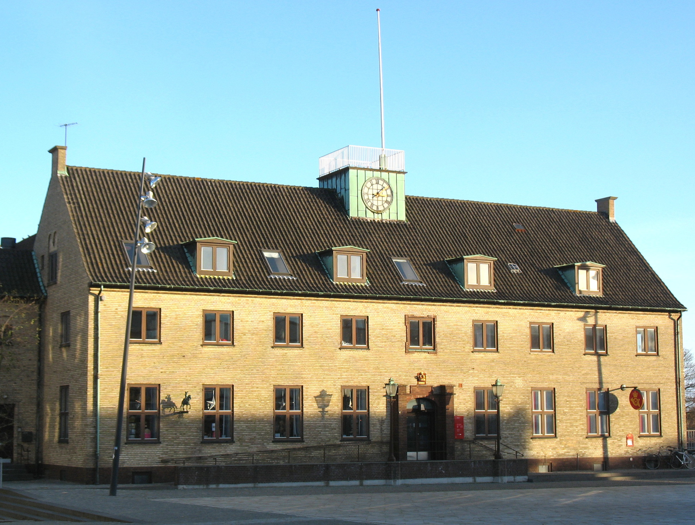 Skive Posthus.